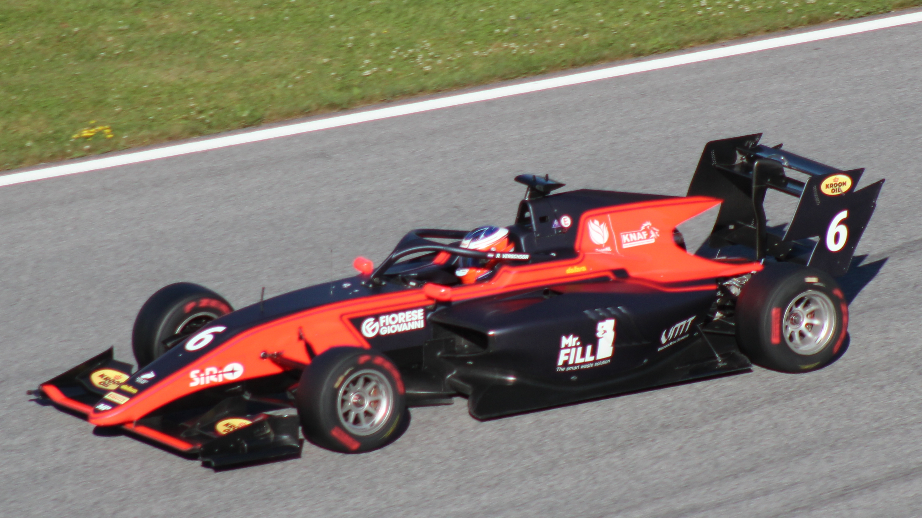 Verschoor beim Rennwochenende in Österreich 2019